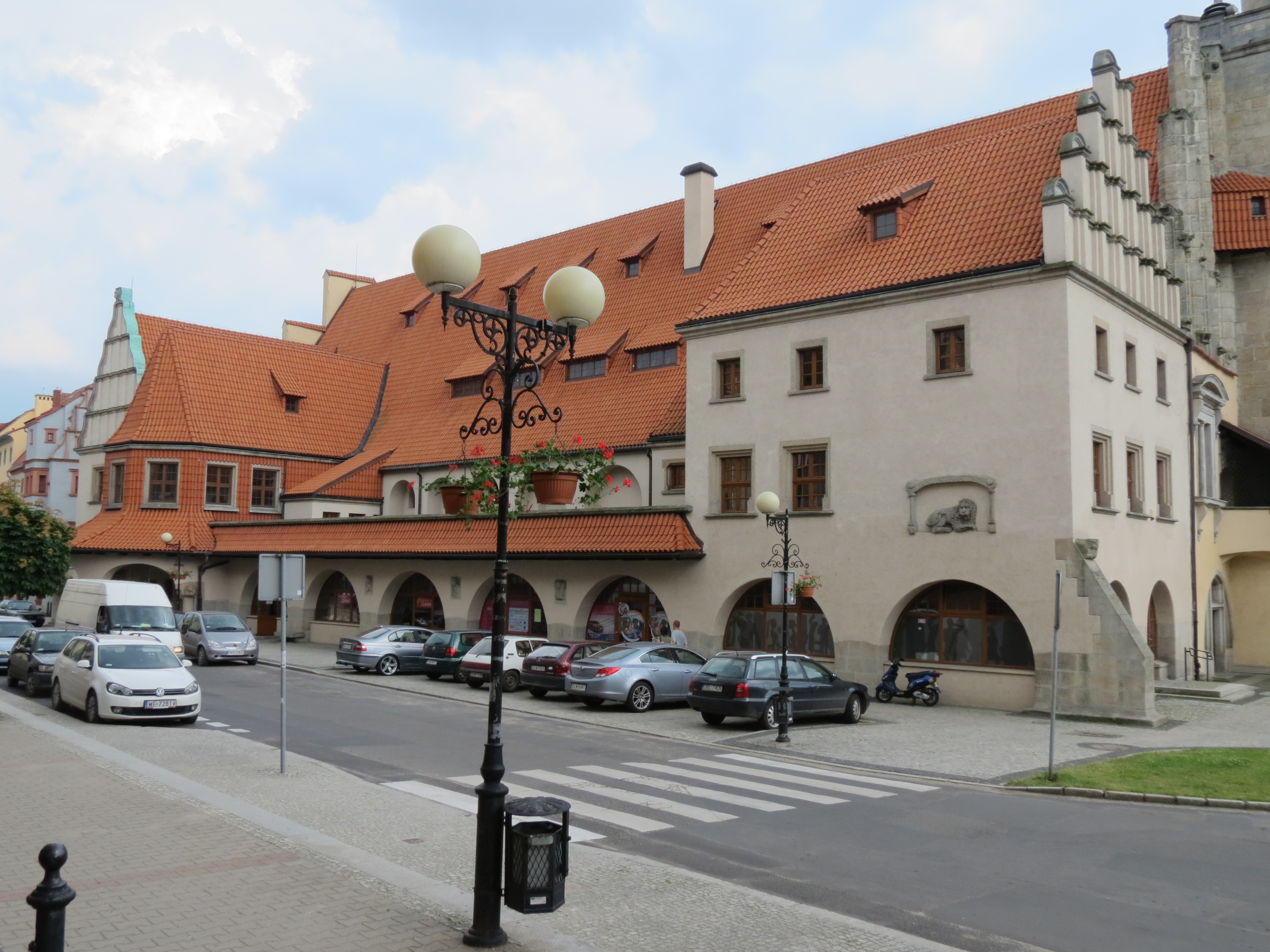 Lwówek Śląski, ratusz, 1522, 1545, 1905